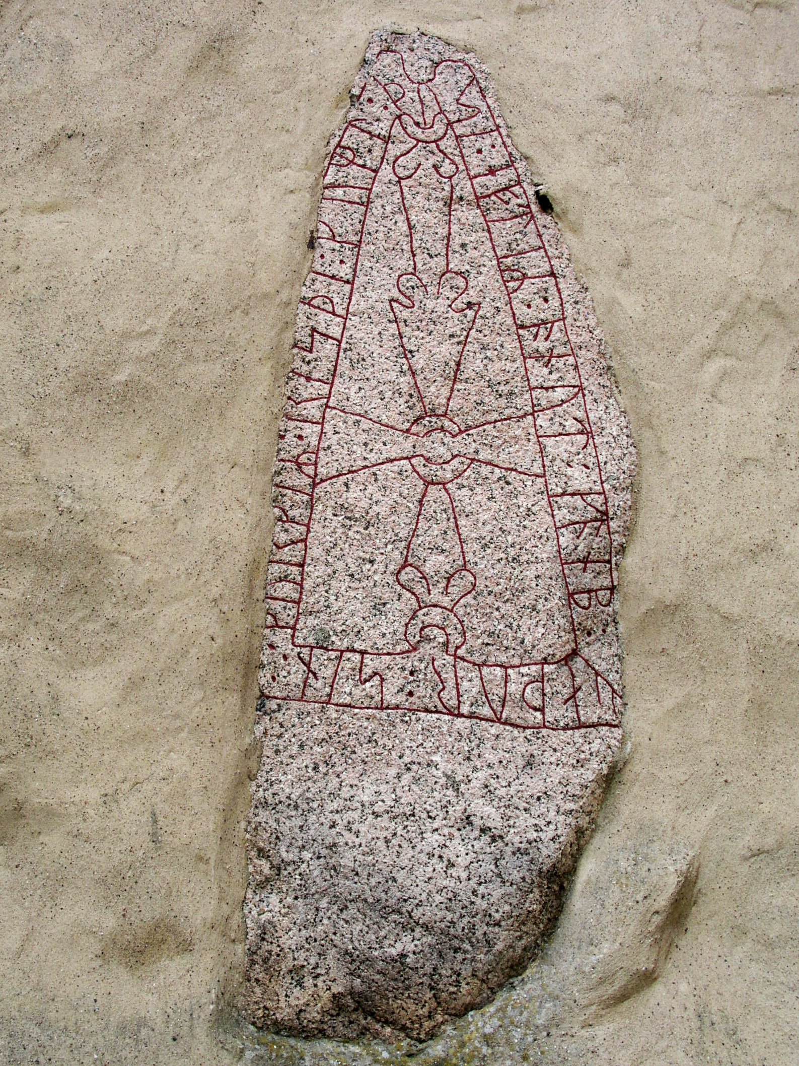 Heda kyrka, Diocese of Linköping, Ödeshögs kommun. Runestone, Östergötlands runinskrifter 131.